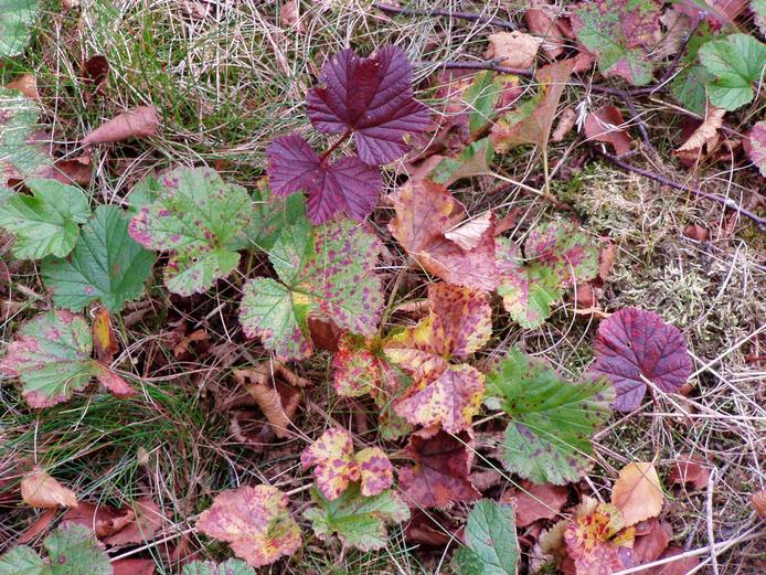 Moltebeere (Rubus chamaemorus) in Herbstverfärbung; Blätter sichtbar von Mai bis Oktober. Aufnahme aus dem Plackenmoor (Teil des NSG „Hahnenknooper Moore“) im Landkreis Cuxhaven, Niedersachsen.